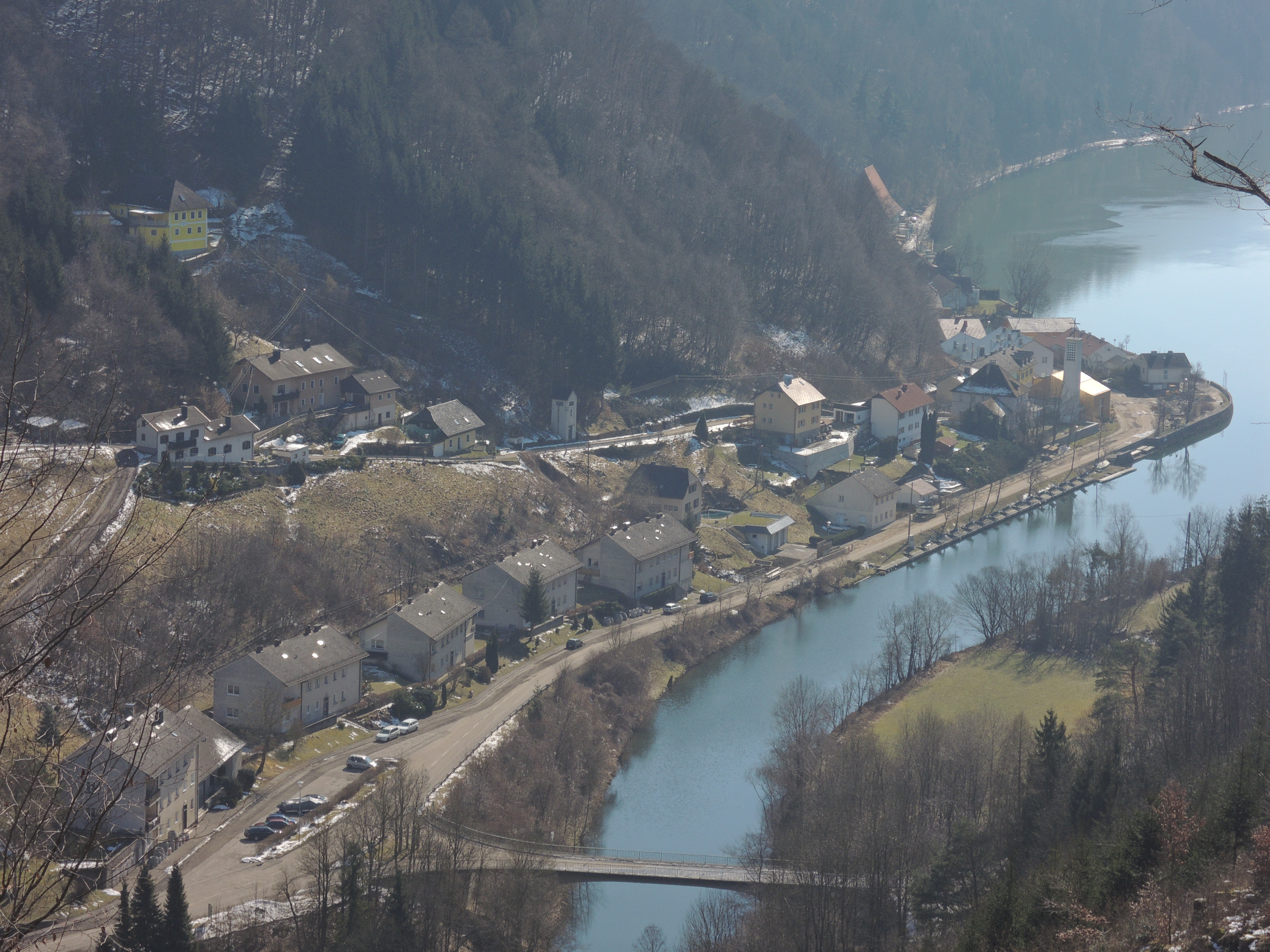 Ansicht von Obermühl an der Donau